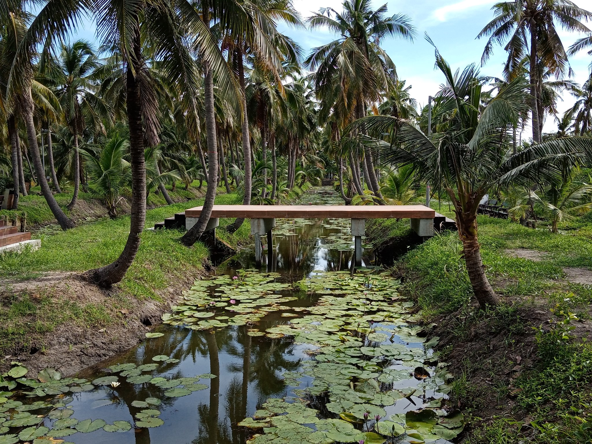 สวนมะพร้าวและท้องร่องสวนภายในสวนทวีวนารมย์